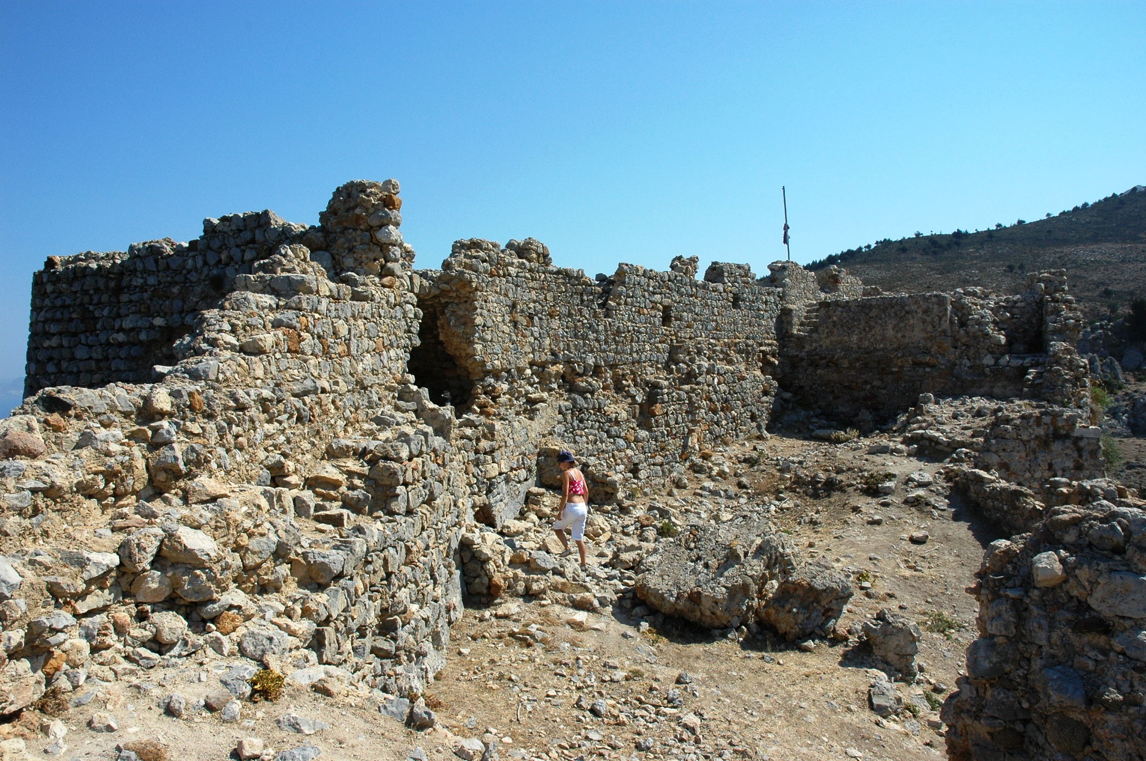 Ruine der Burg Paleo Pyli